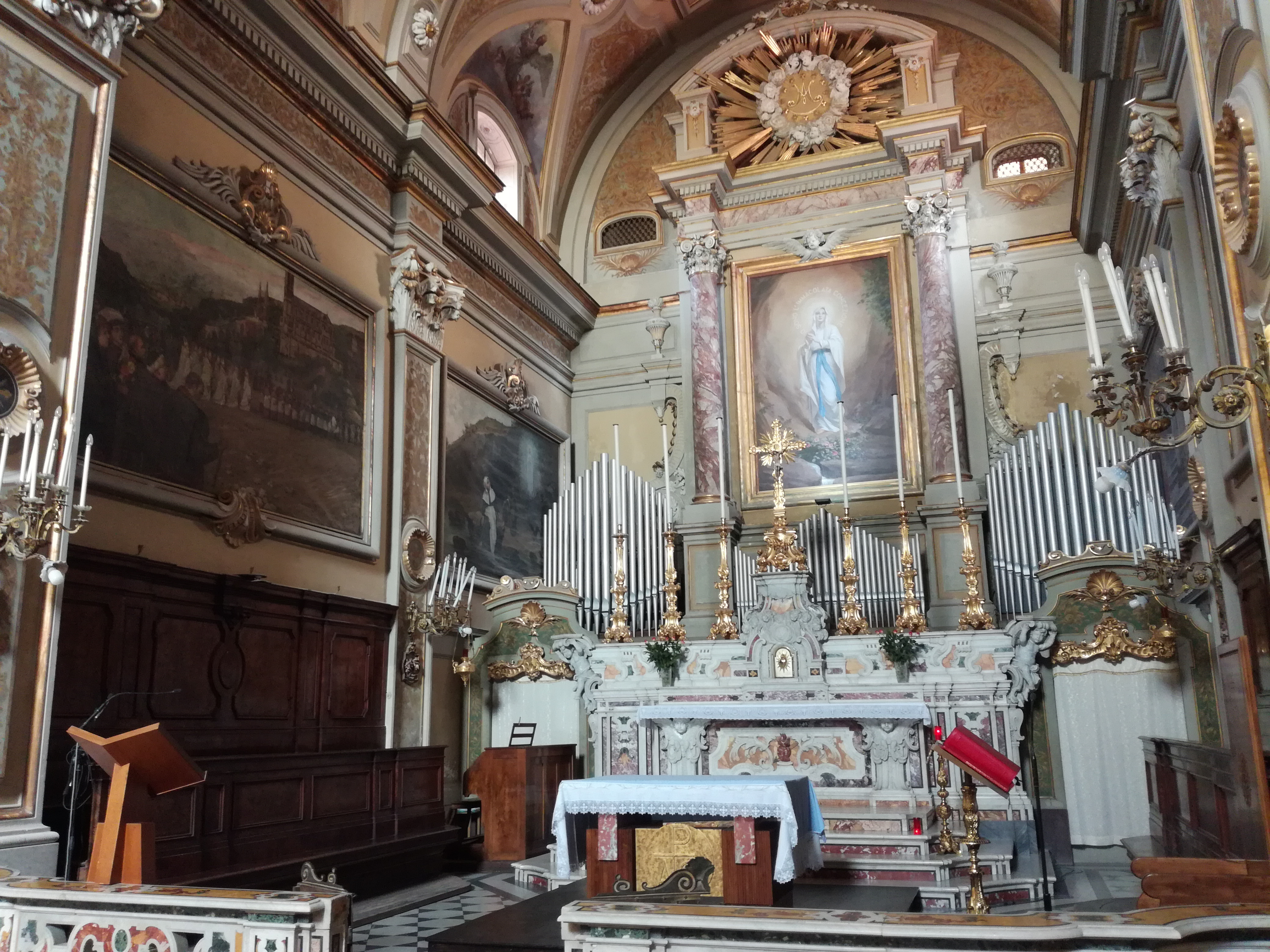 Chiesa di San Nicola da Tolentino (Napoli, interno)